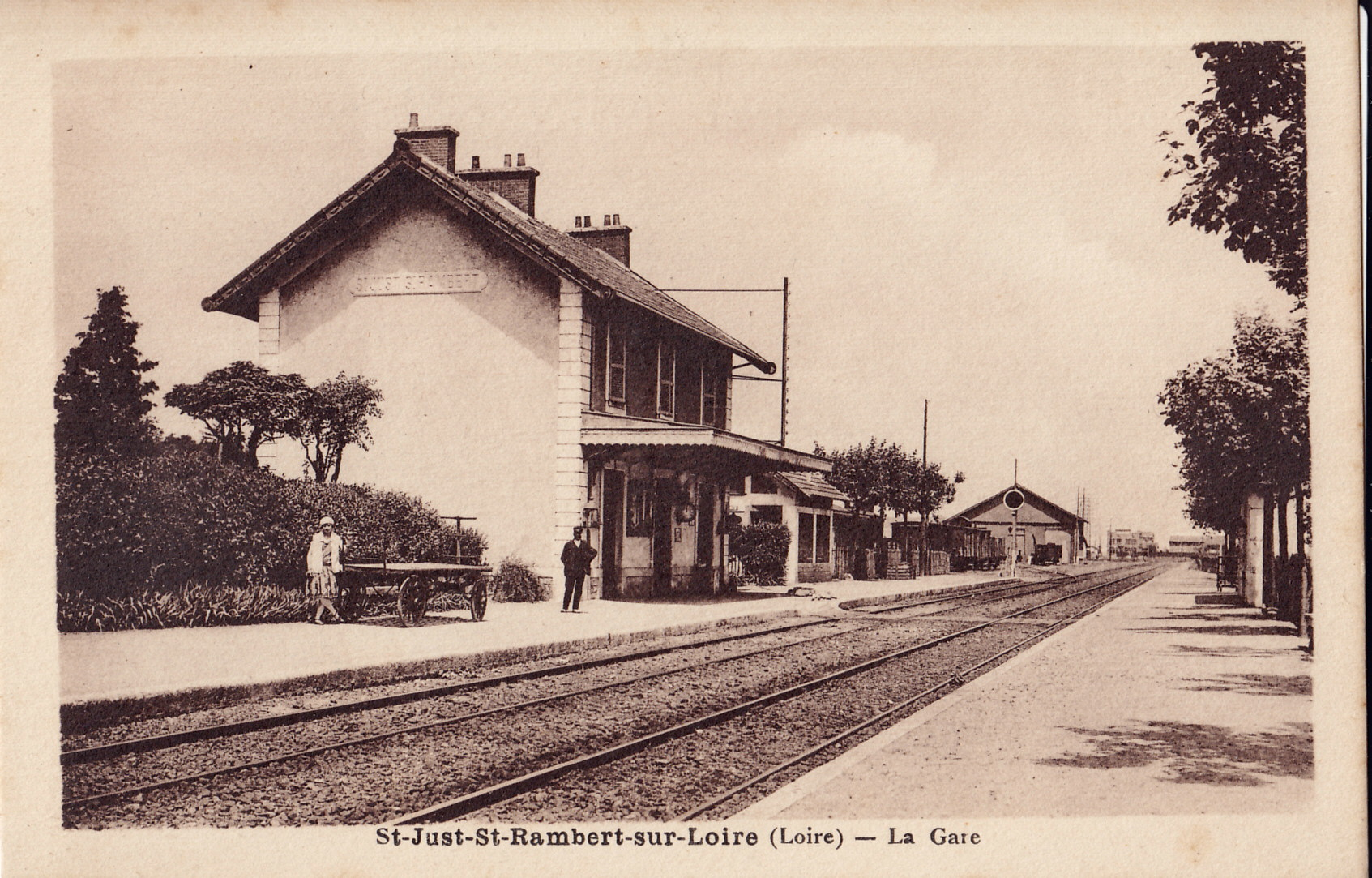 Carte postale ancienne éditée par Dumas : St-JUST-St-RAMBERT-SUR-LOIRE - La gare